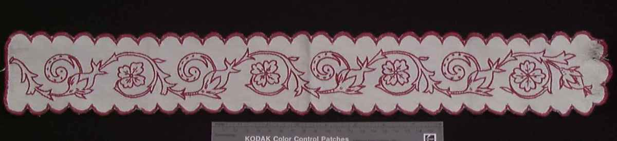 Ostebånd i bomull fra Ringsaker i Hedmark, brodert omkring 1900. Foto Anne-Lise Reinsfelt / Norsk Folkemuseum, NF.1982-0188.